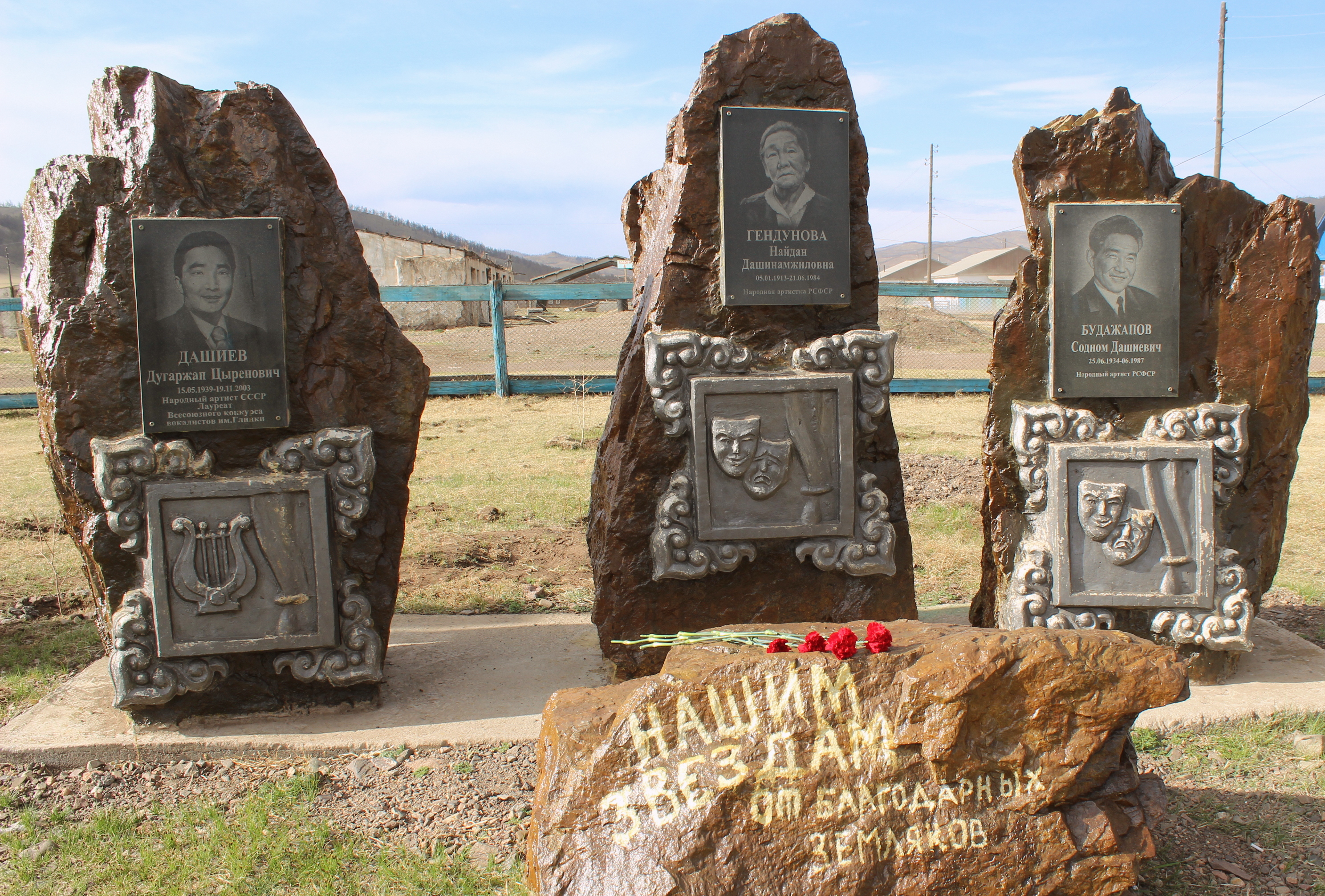 Памятник с мемориальными плитами знаменитым землякам-народным артистам Дугаржапу Дашиеву, Содному Будажапову и Найдан Гендуновой в Верхнем Торее. Бурятия, Джидинский район